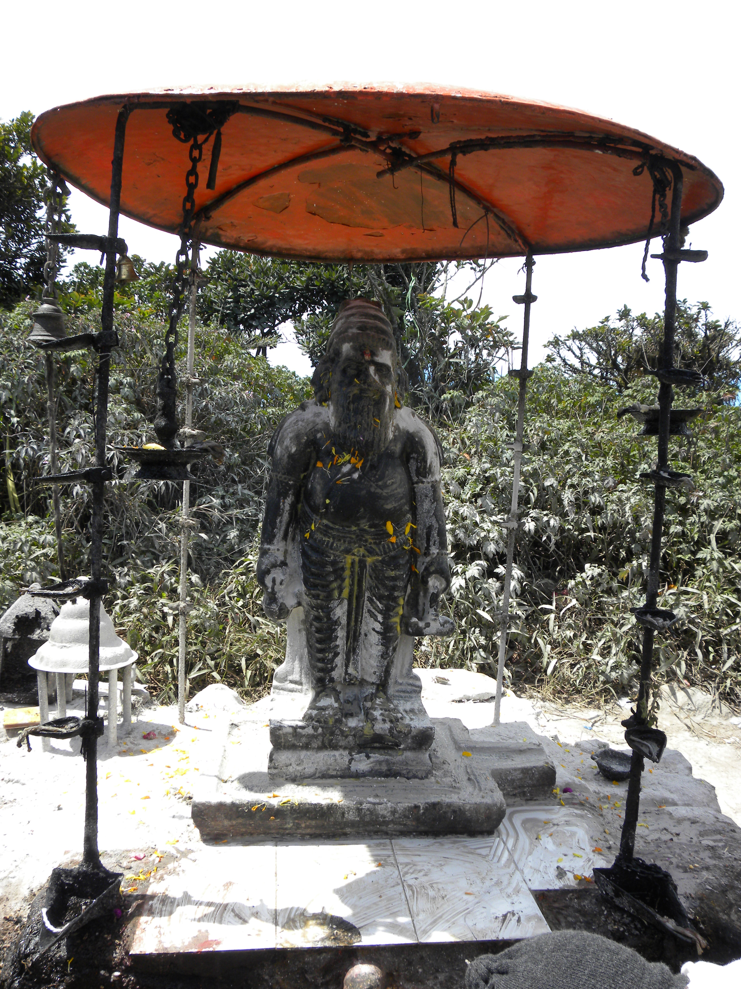 Agastya ( Tamil:அகத்தியர் Akattiyar, Sanskrit:अगस्त्य, Malay: Anggasta, Thai: Akkhot) was a Tamil/Vedic Siddhar or sage.